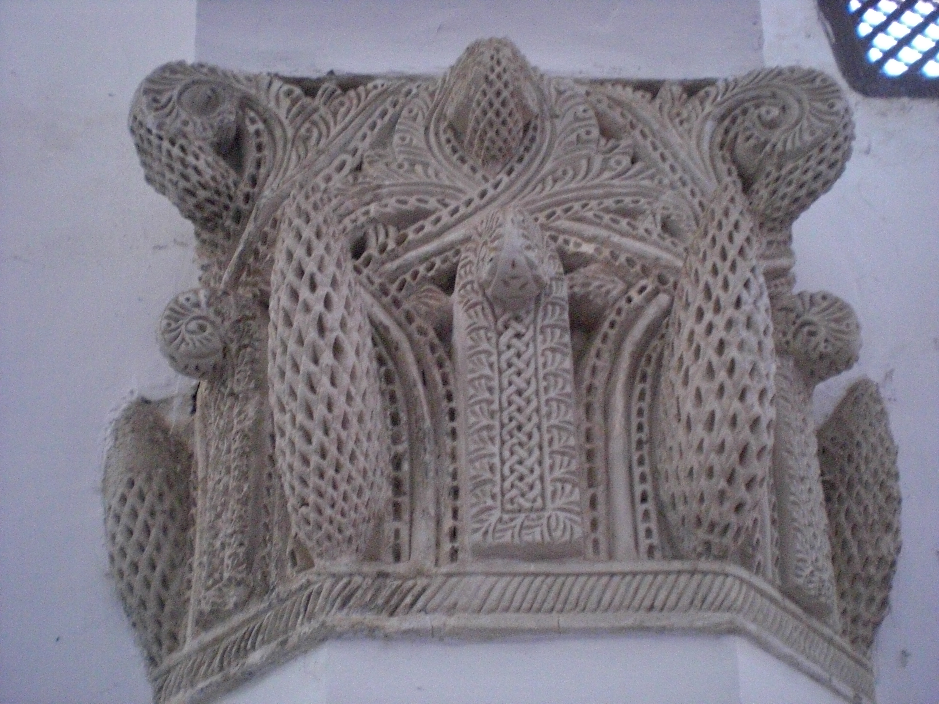 Kapitelaj strobiloj en la kirko Santa María la Blanca de Toledo.